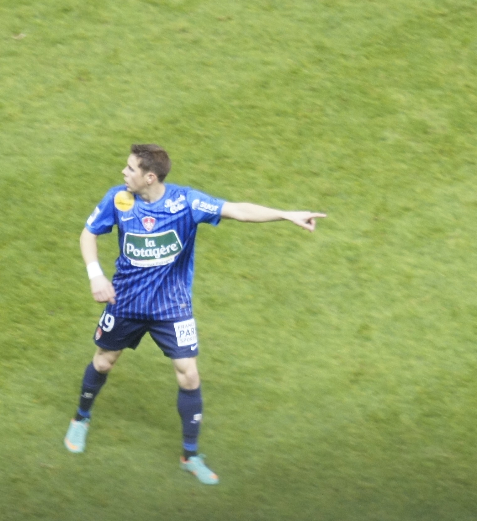 Benoît Lesoimier jouant au stade Delaune, 2012.